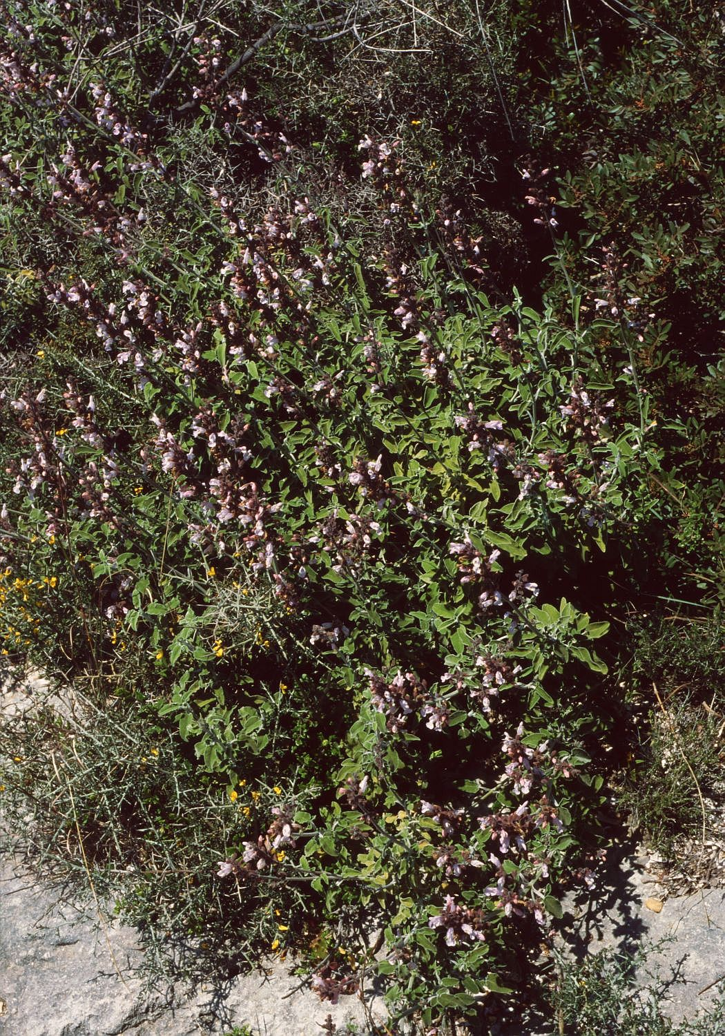 Salvia fruticosa, Lippenblütler (Lamiaceae) – Griechenland/Ελλάδα/Greece: Kato Katelios/Κάτω Κατελειός (Kefallinia/Κεφαλληνία)